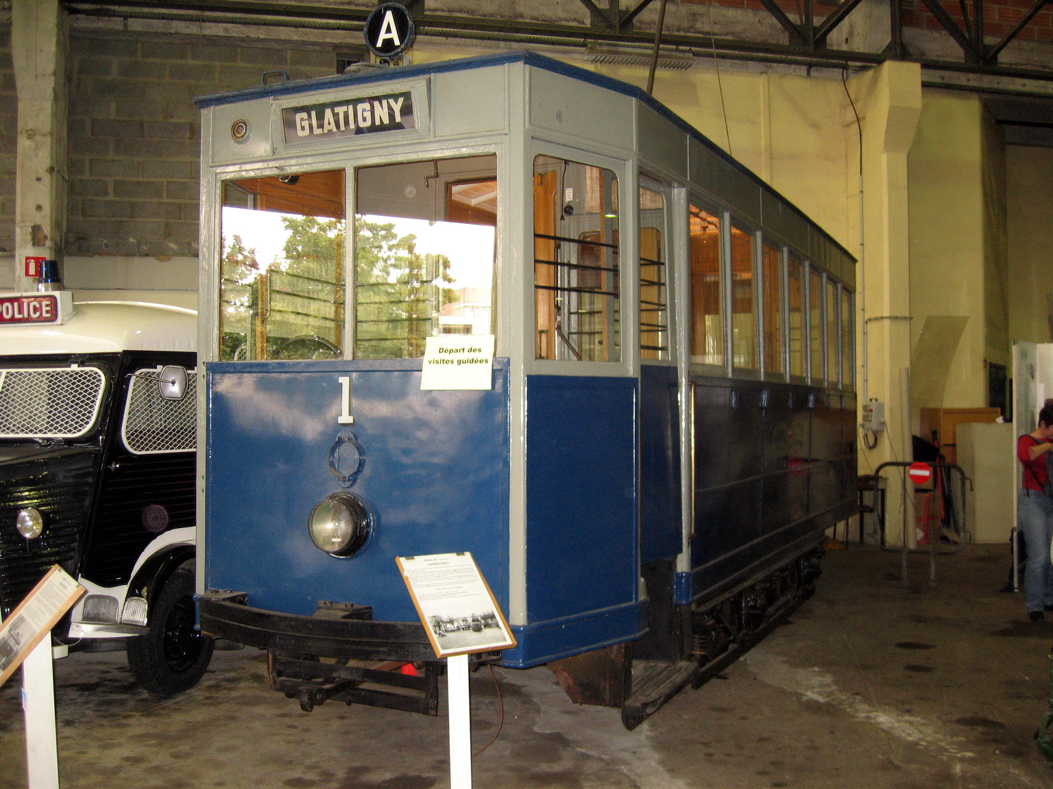 Ancien tramway de Versailles à l'AMTUIR 15/09/2007.